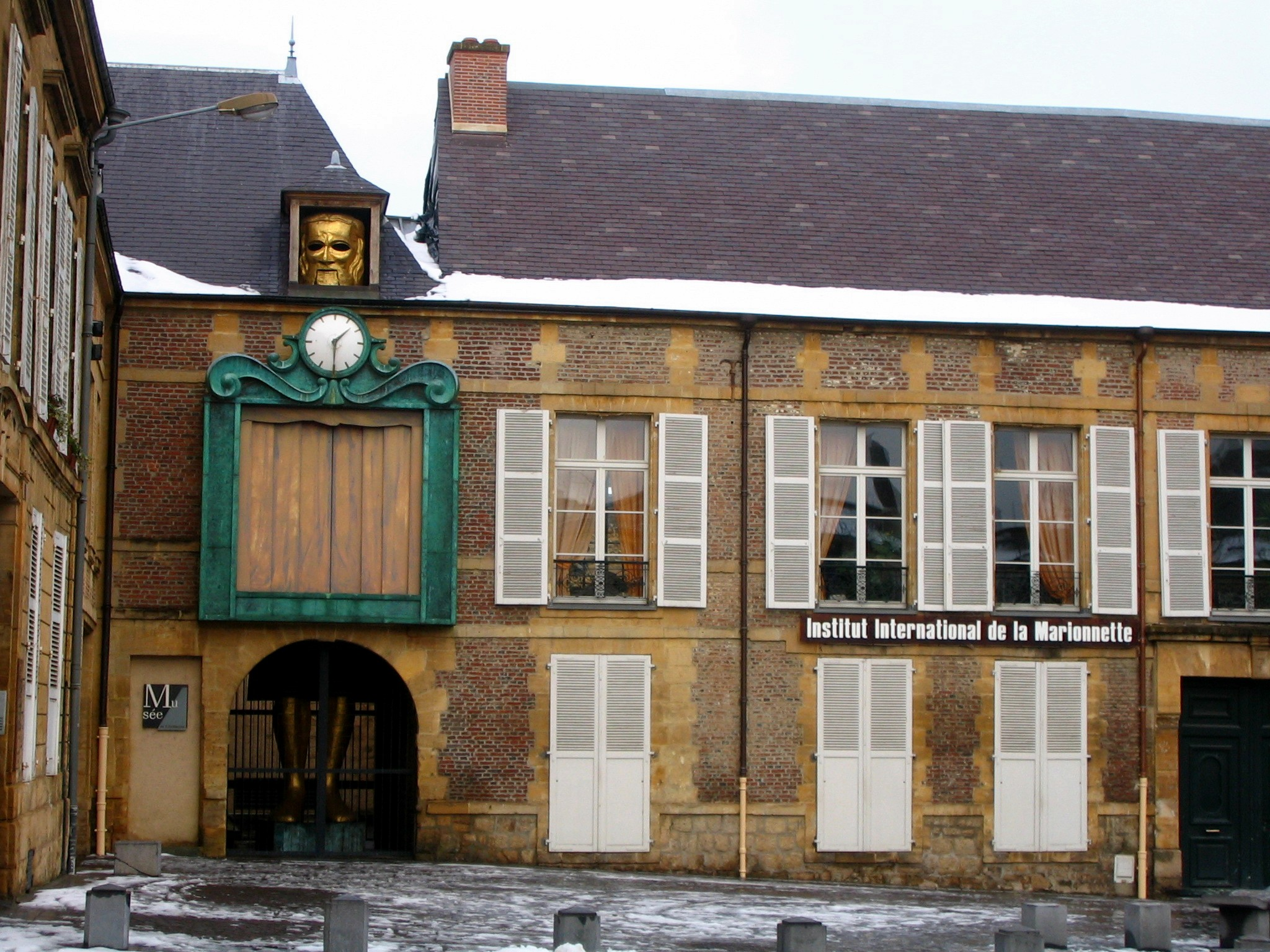 Institut international de la marionette Charleville-Mézières